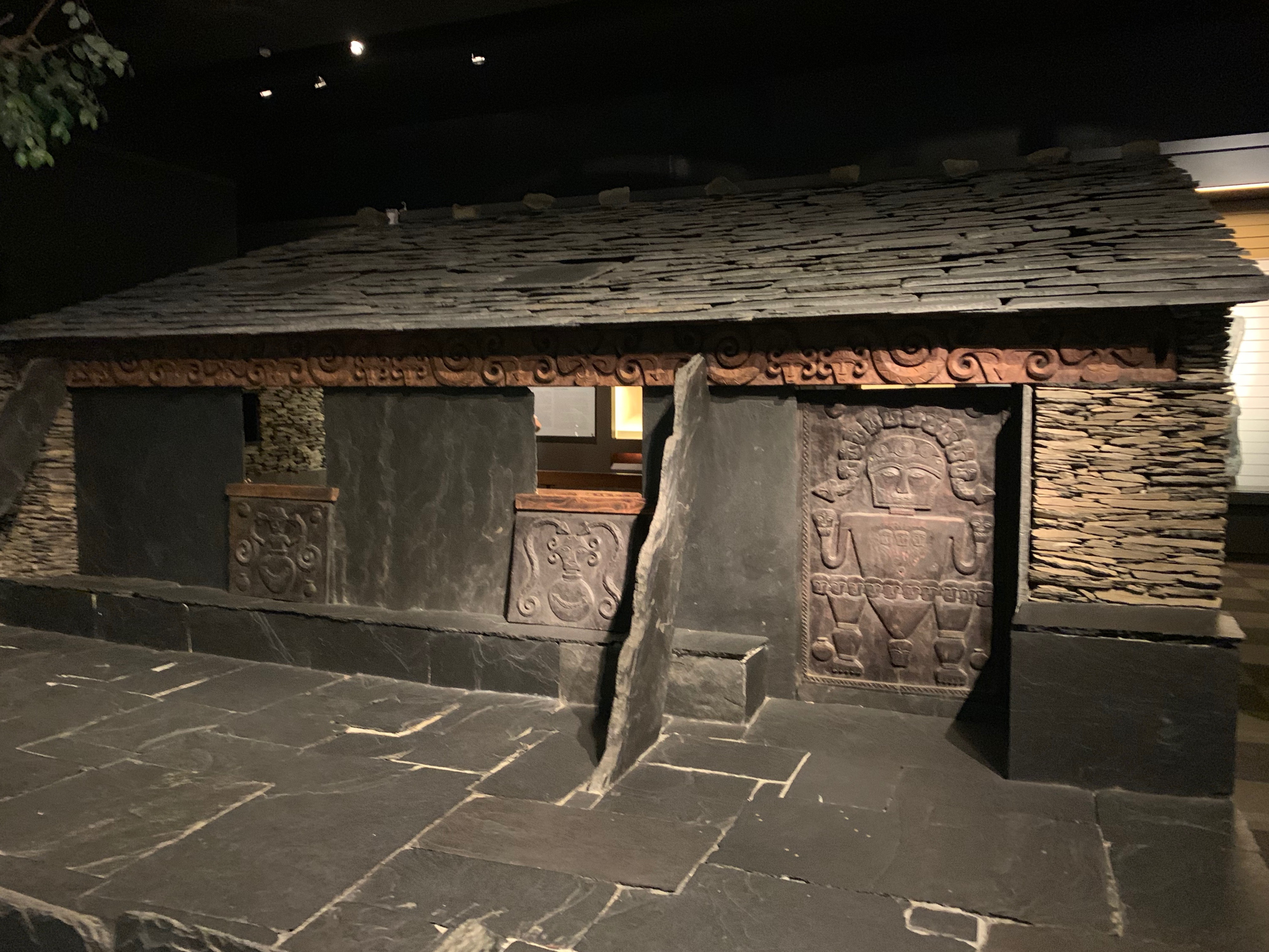 一座排灣族石板屋，國立自然科學博物館，臺中市。